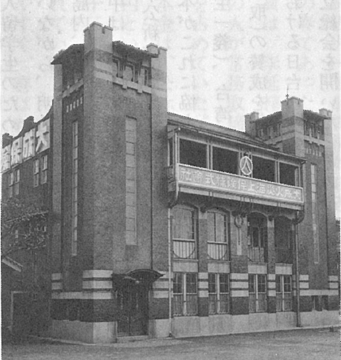 中文（台灣）: 昭和時期大成火災1